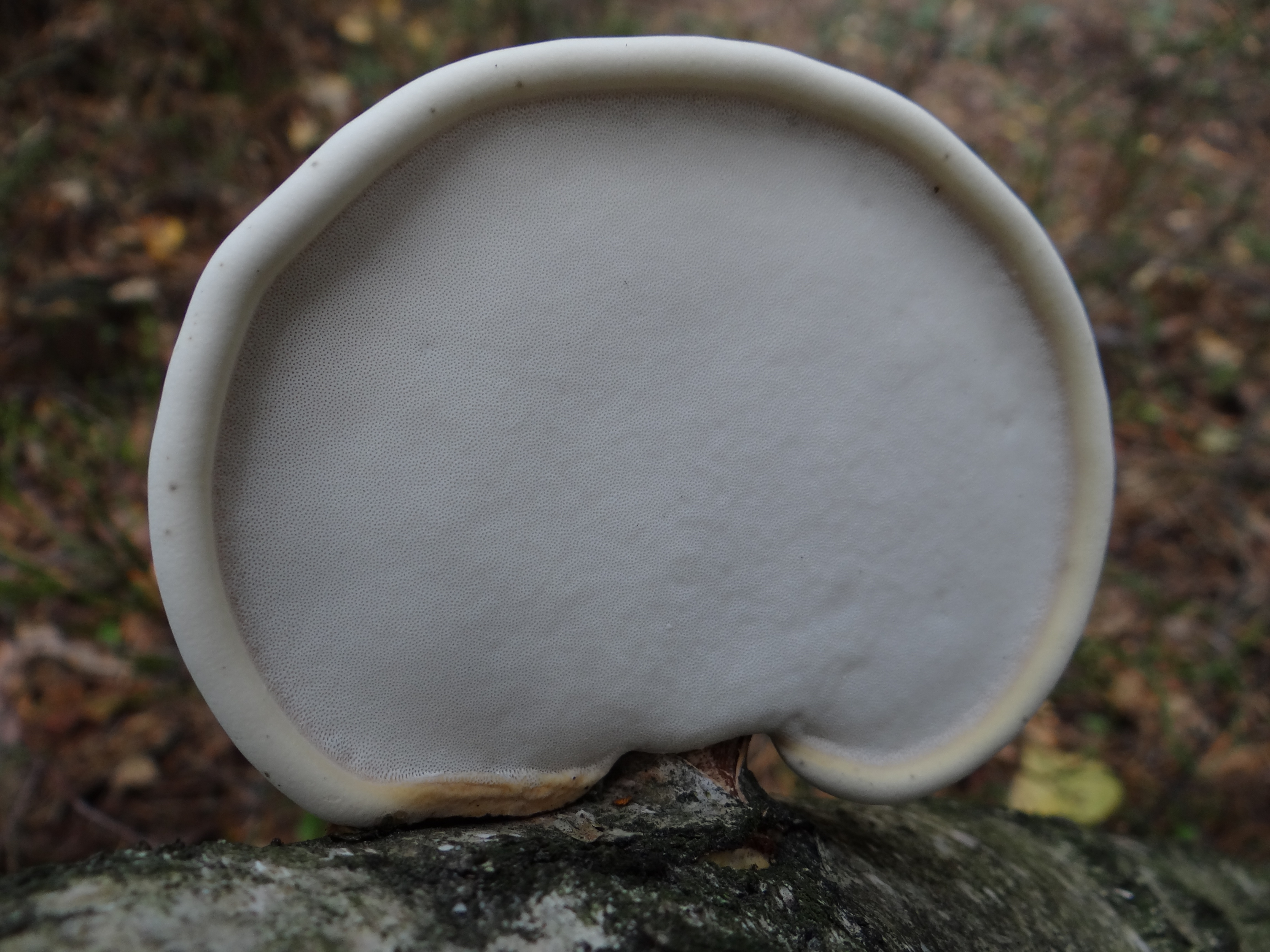 Piptoporus betulinus